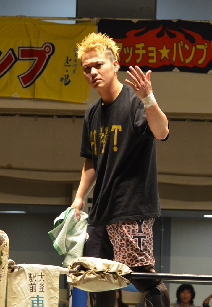 フジタ“Jr”ハヤ